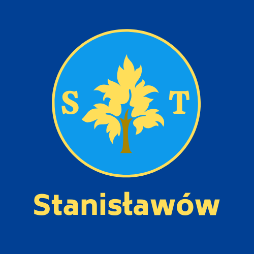 Stanisławów koło Złoczewa logo